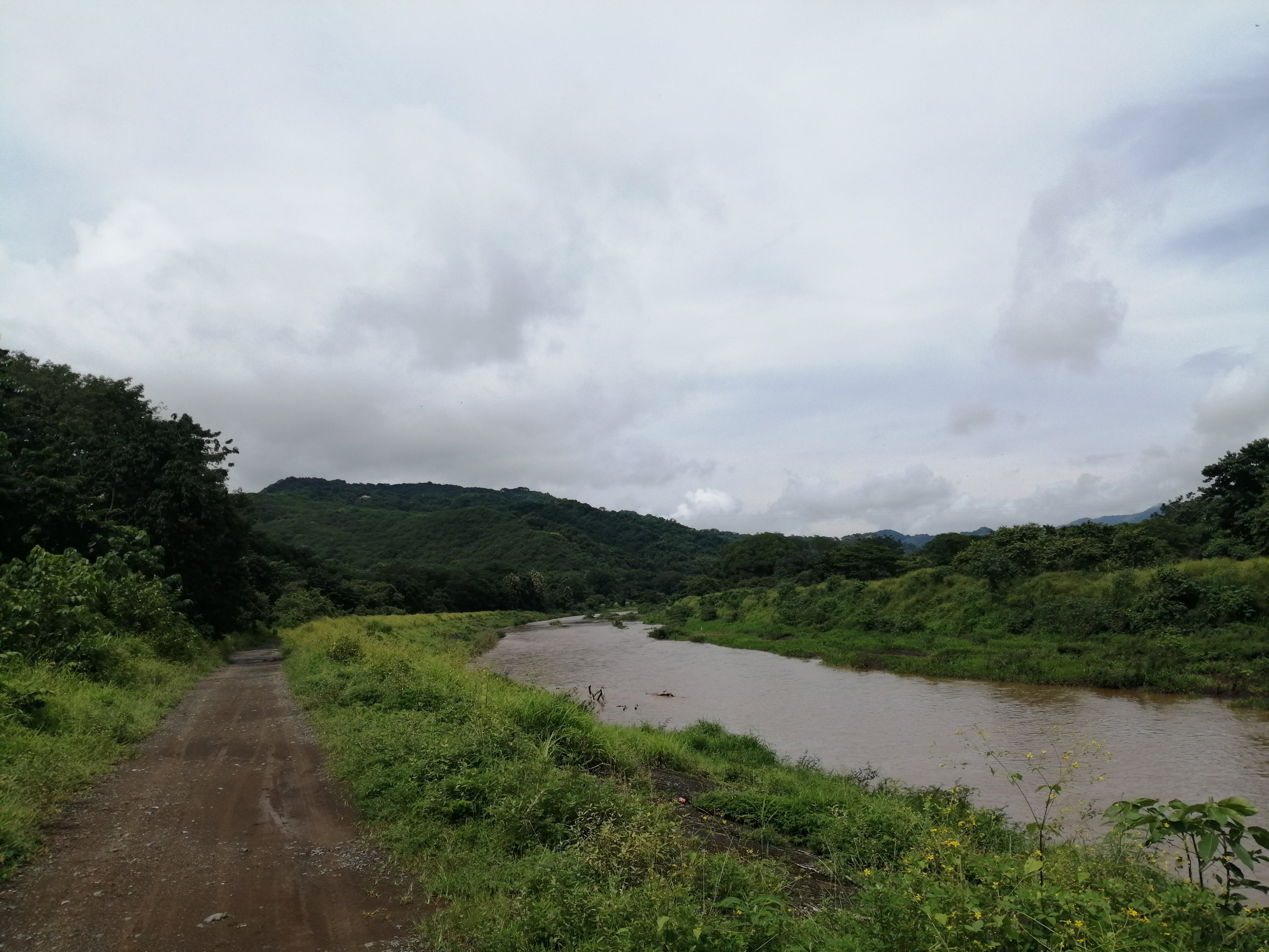 Rio Nosara en la estación lluviosa, Nosara, Costa Rica